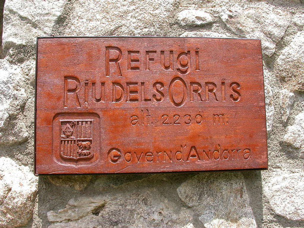 Refuges Andorre